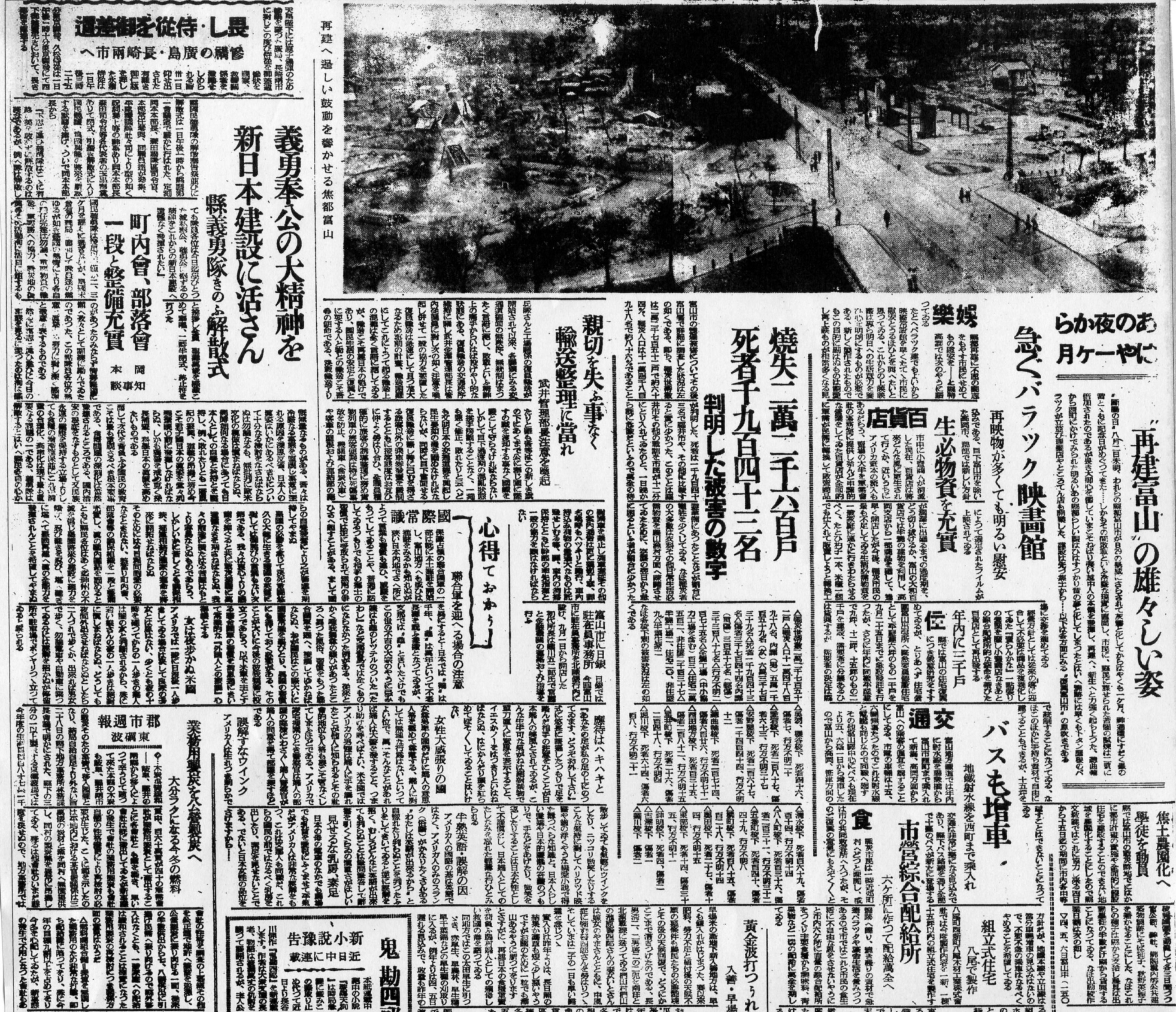 富山大空襲から一ヶ月後の富山市